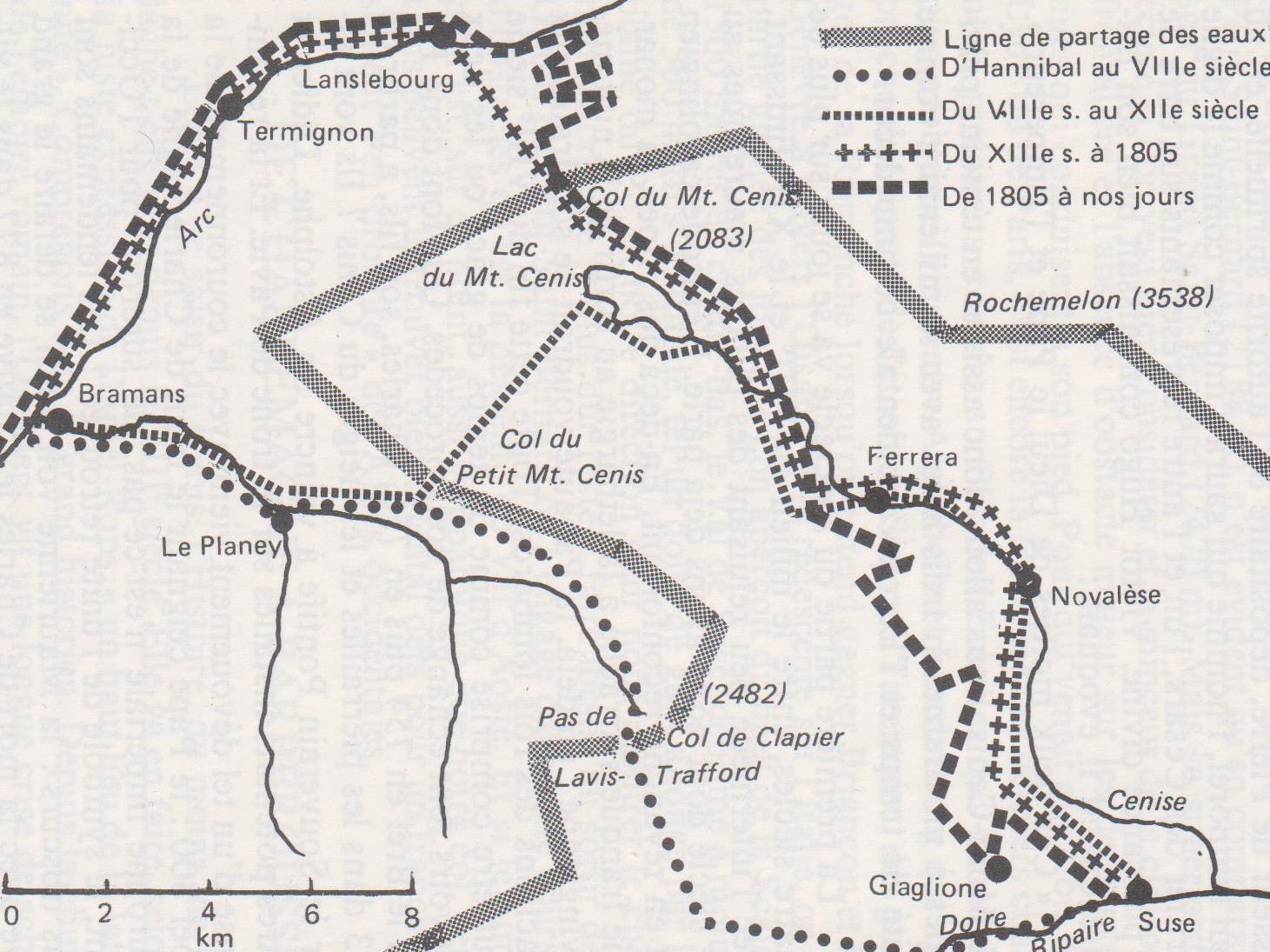 ll y a eu successivement 4 itinéraires pour le passage du Montcenis